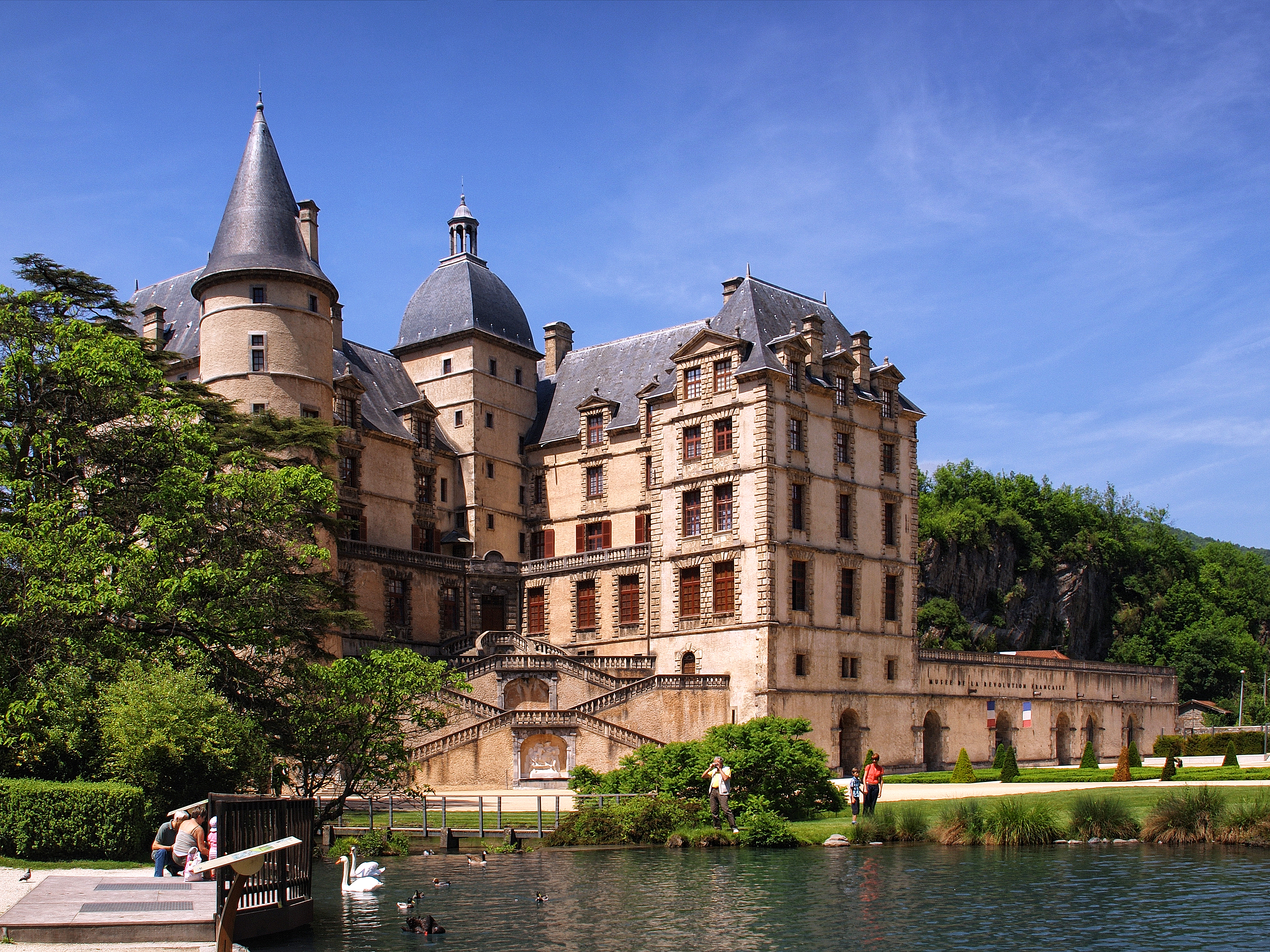 Vizille - Château et plan d'eau